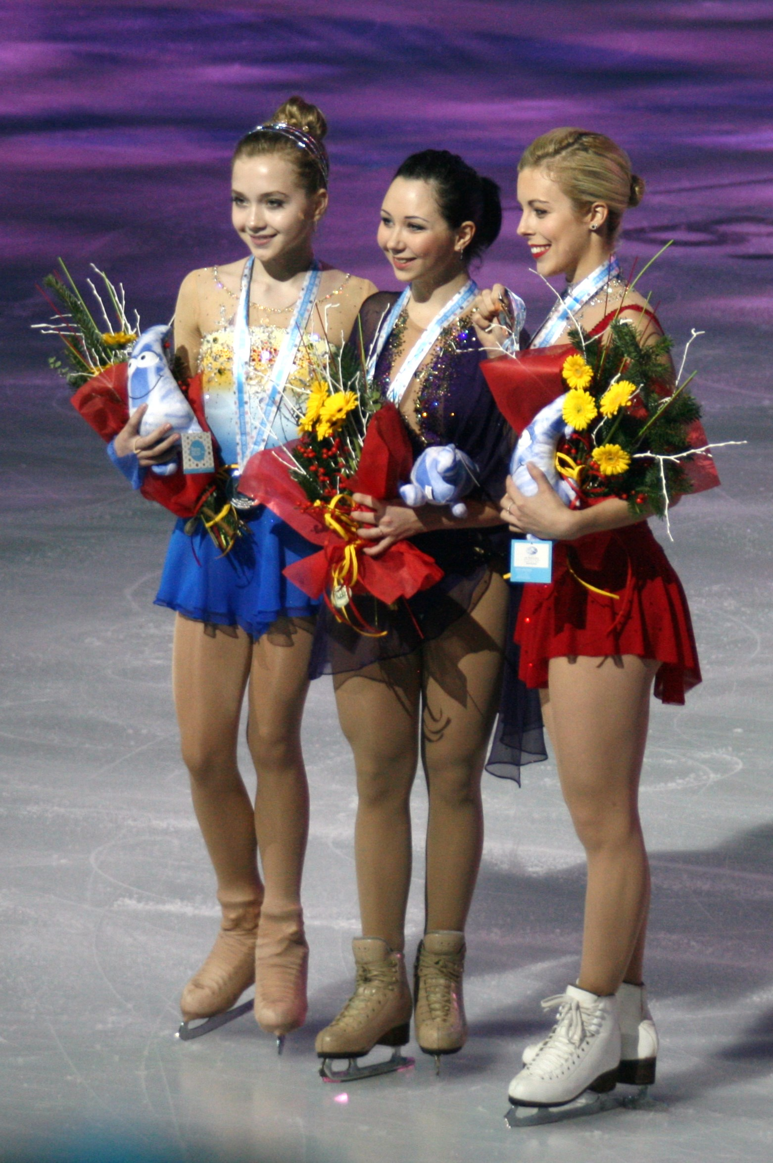 Церемония награждения в женском одиночном катании на финале Гран-при 2014-2015. Слева на право: Елена Радионова(Россия) - 2 место, Елизавета Туктамышева (Россия) - 1 место, Эшли Вагнер (США) - 3 место.